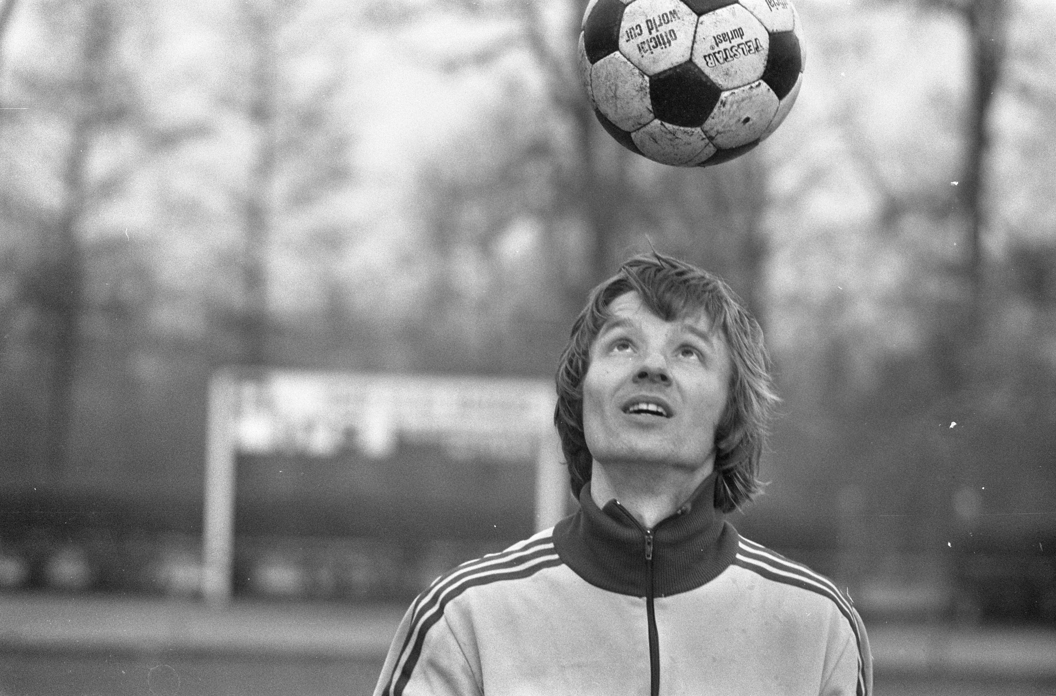 Varga Zoltán labdát bűvöl